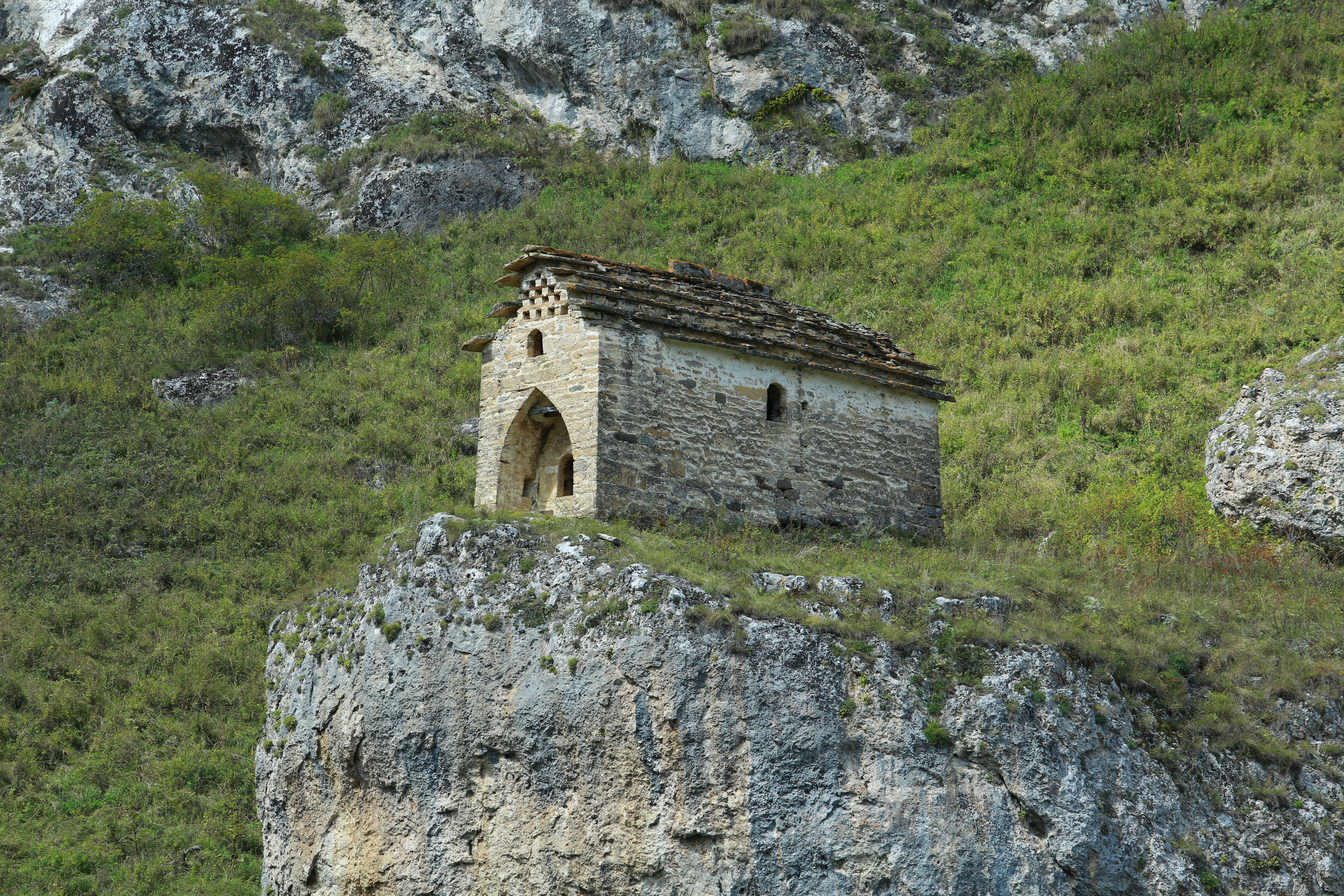 Домик красавицы в Дойничу